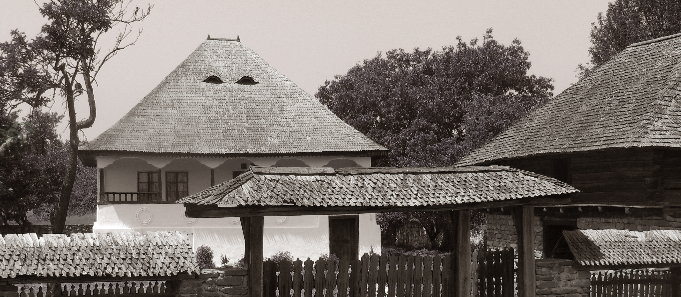 farm from Buzau, Golesti Museum gospodarie din Buzau, Muzeul Golesti Complexul Muzeal National Golesti Muzeul Viticulturii si Pomiculturii Golesti